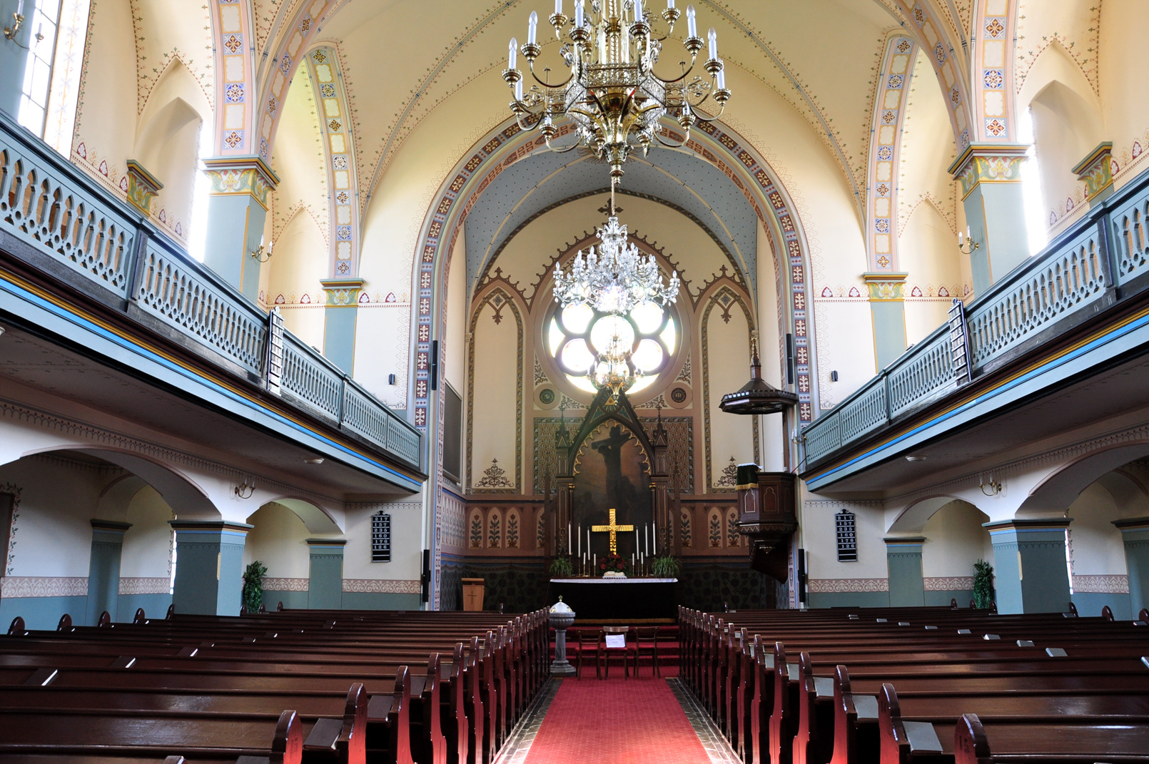 Szent Miklós plébániatemplom.